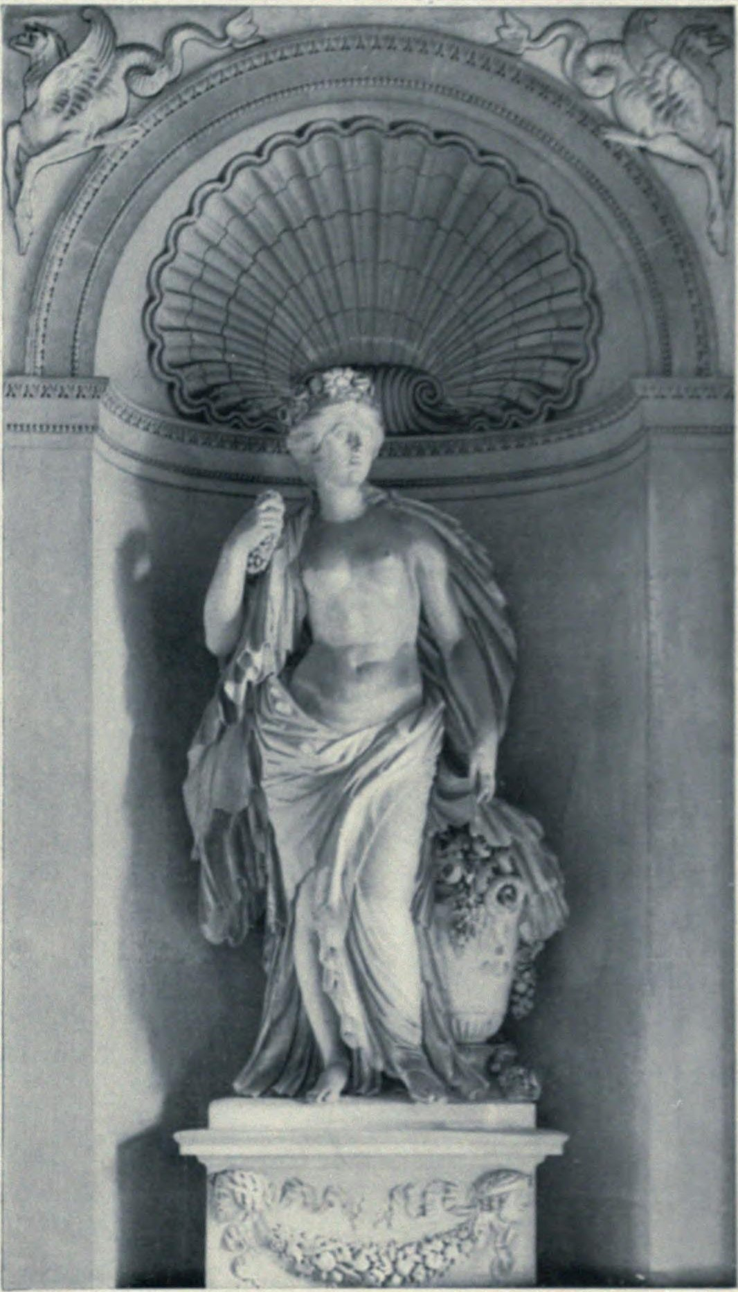 Flore, salle à manger d'été du château de Maisons-Laffitte